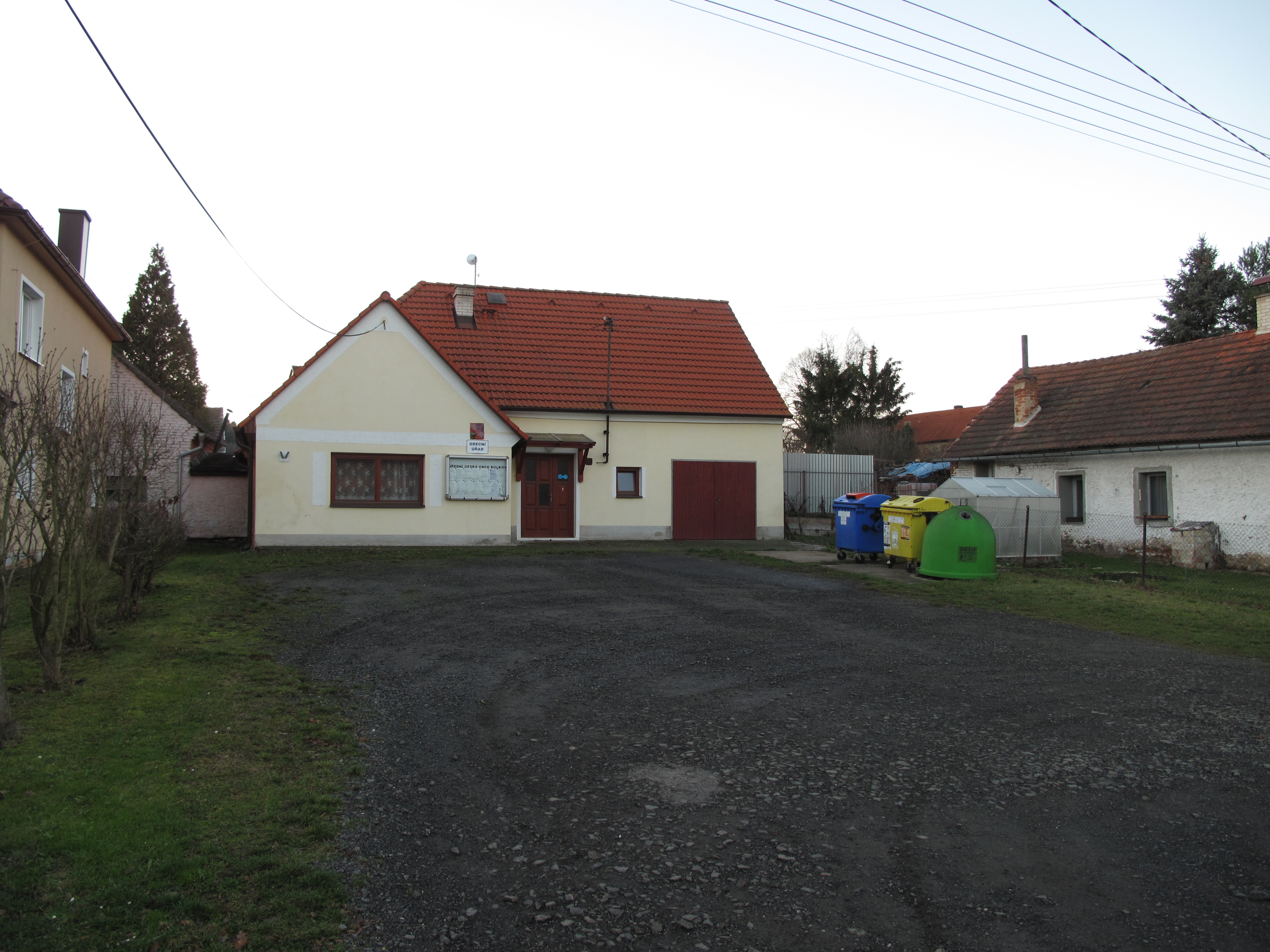 Obecní úřad v Bolkově. Okres Plzeň-jih, Česká republika.